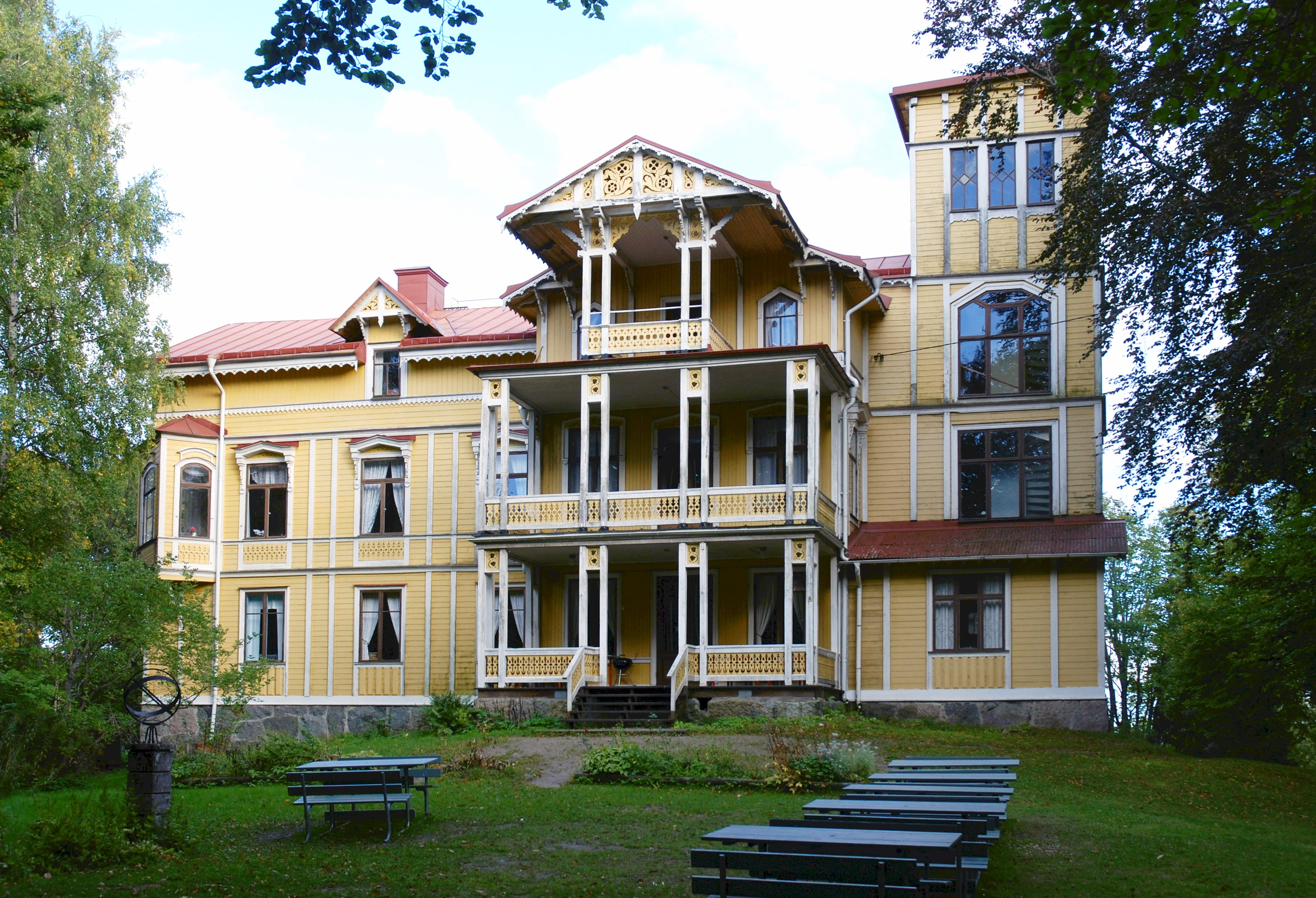 Sillvik, Norsborg, Botkyrka, Sweden